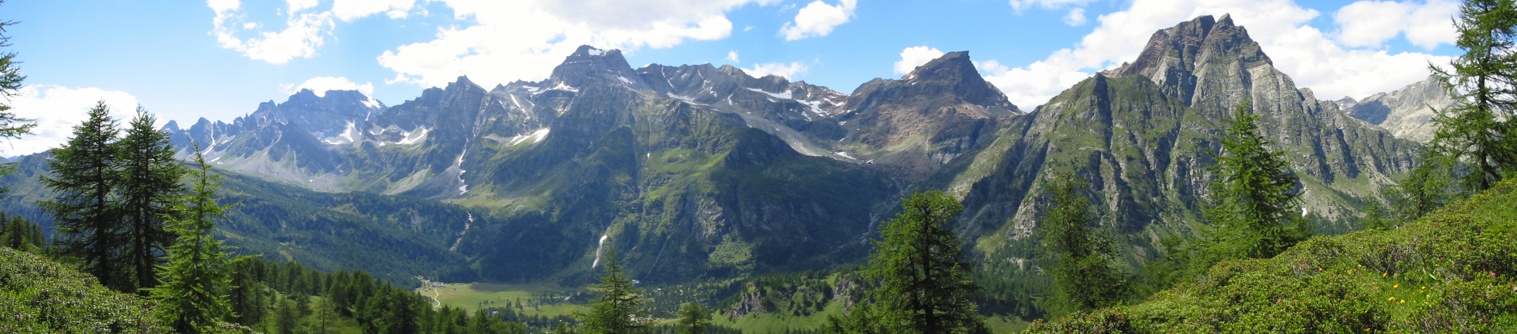 Vista dei monti di Devero (VCO, Italia), tra cui: il monte Cervandone, la Punta della Rossa, pizzo Crampiolo.